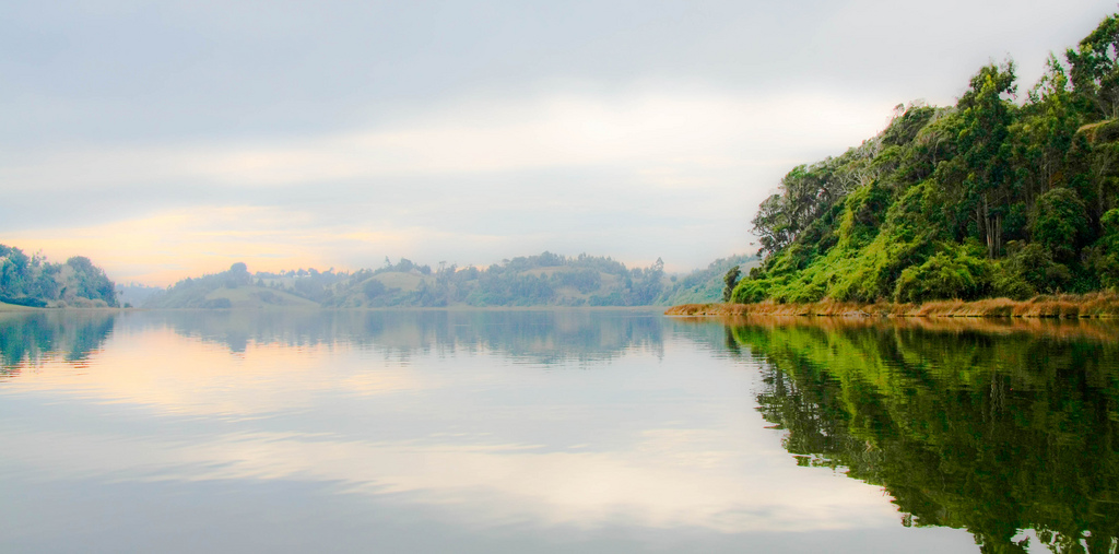 Vista del lago Budi atardecer